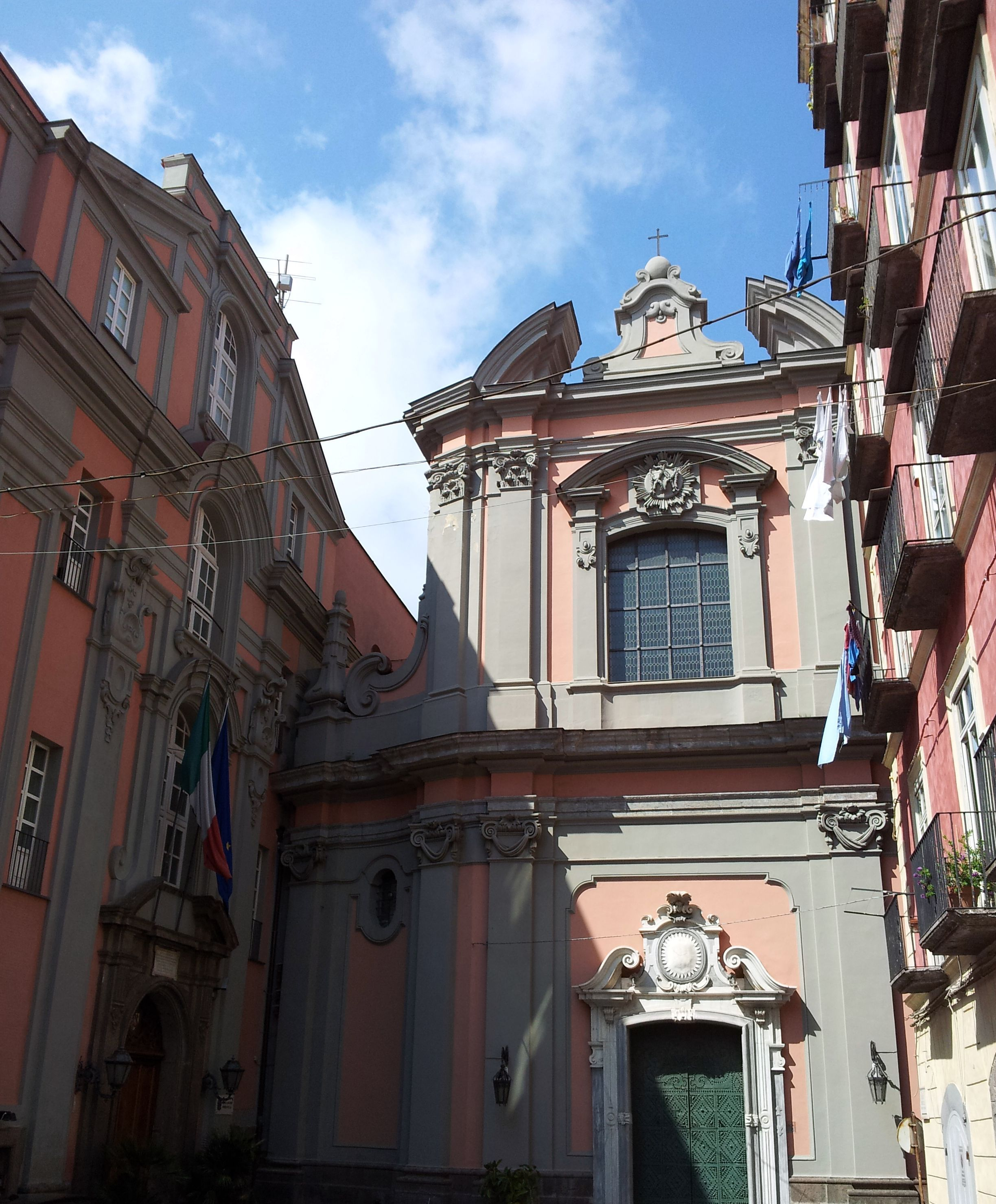 Chiesa della Nunziatella (Napoli)